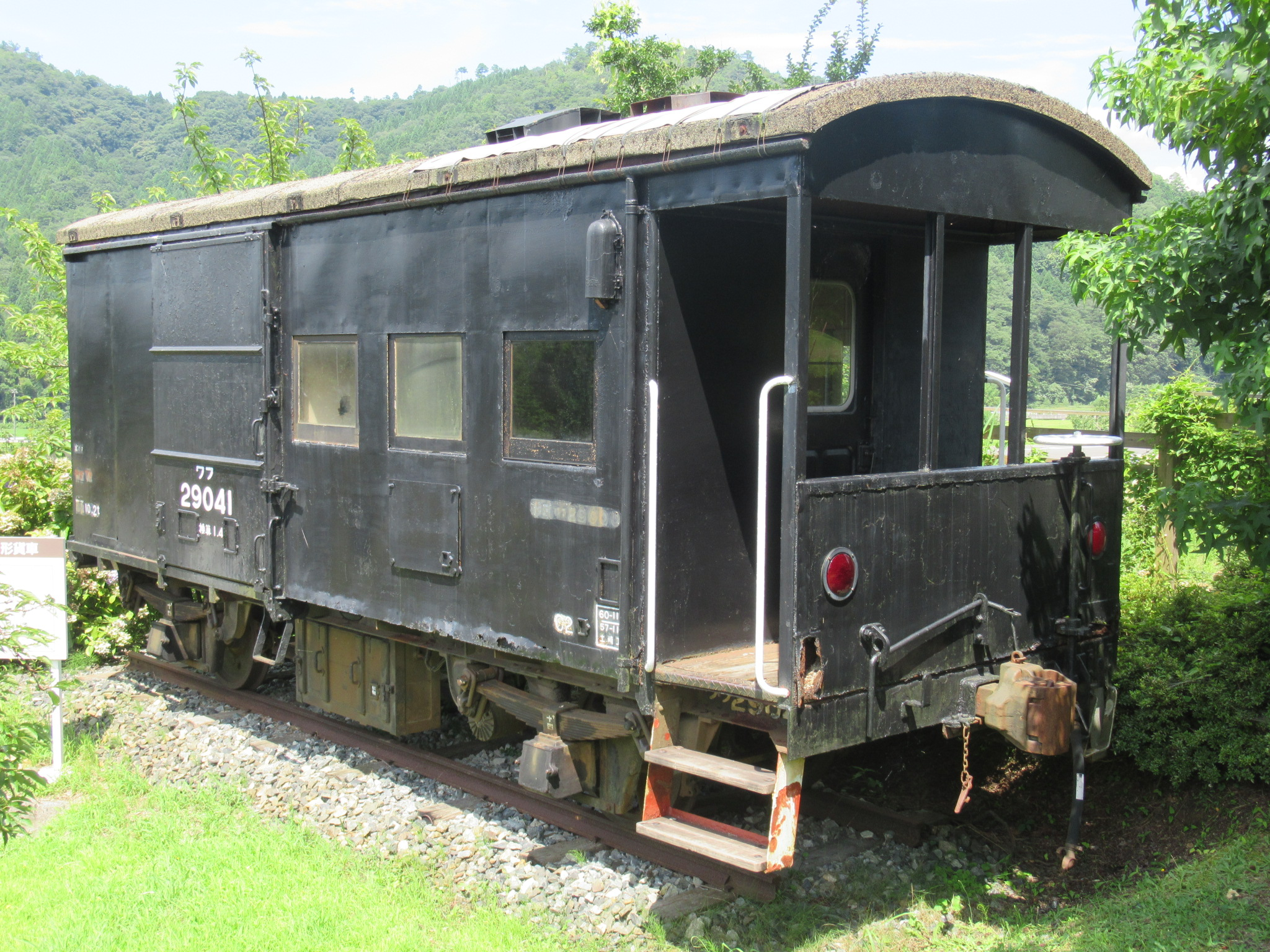 船岡竹林公園に保存されているワフ29041